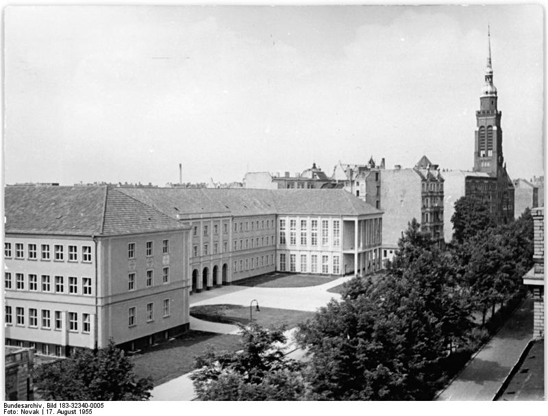 Berlin, Prenzlauer Berg, Grundschule 12 Zentralbild Novak 17.8.1955 12.Grundschule Prenzlauer Berg In dem Gebäude der 12. Grundschule Berlin-Prenzlauer Berg in der Schönhauser Alle - das im Mai 1955 fertig wurde, sind ausserdem eine Station Junger Techniker, ein Wochenheim, ein Kindergarten und die Abteilung Volksbildung des Rates des Stadtbezirkes Prenzlauer Berg untergebracht. UBz: Wenn die Ferien zu Ende sind, wird in dieses Haus fröhliches Kinderlachen, aber auch der Ernst des Lernbeflissenen, wieder einziehen.